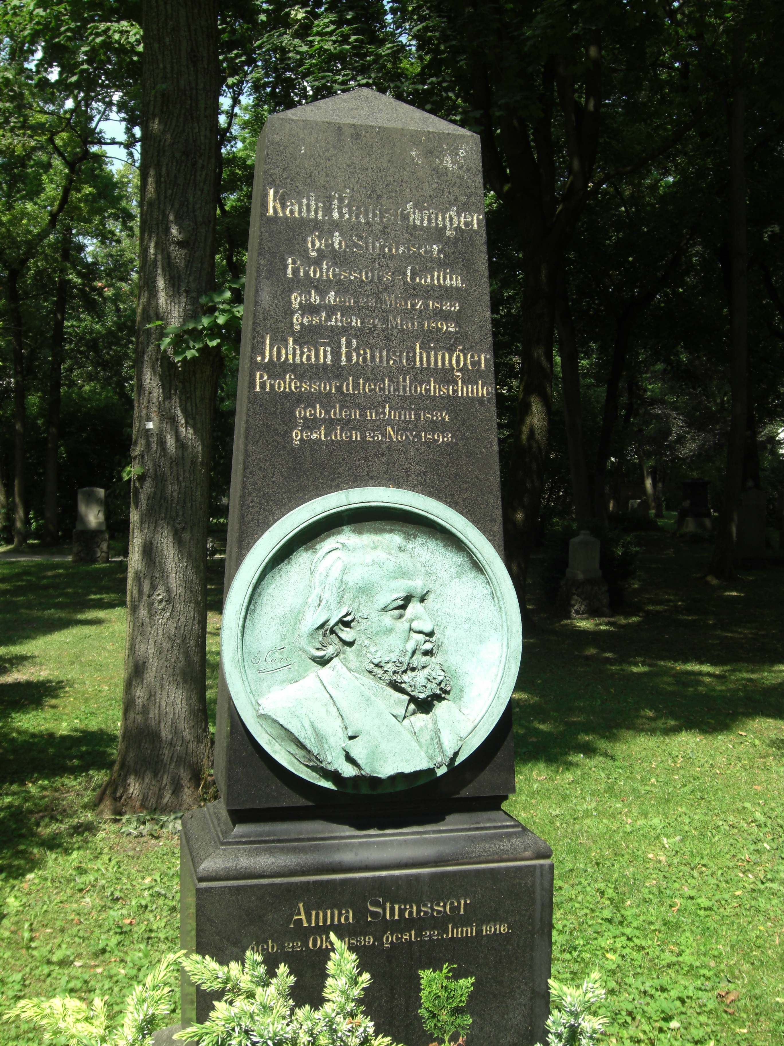 Grab des Mathematikers und Bautechnikers Johann Bauschinger (* 11. Juni 1834 in Nürnberg; † 25. November 1893) auf dem Alten Nördlichen Friedhof in München.